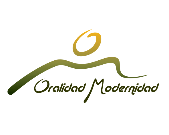 Logo del proydcto